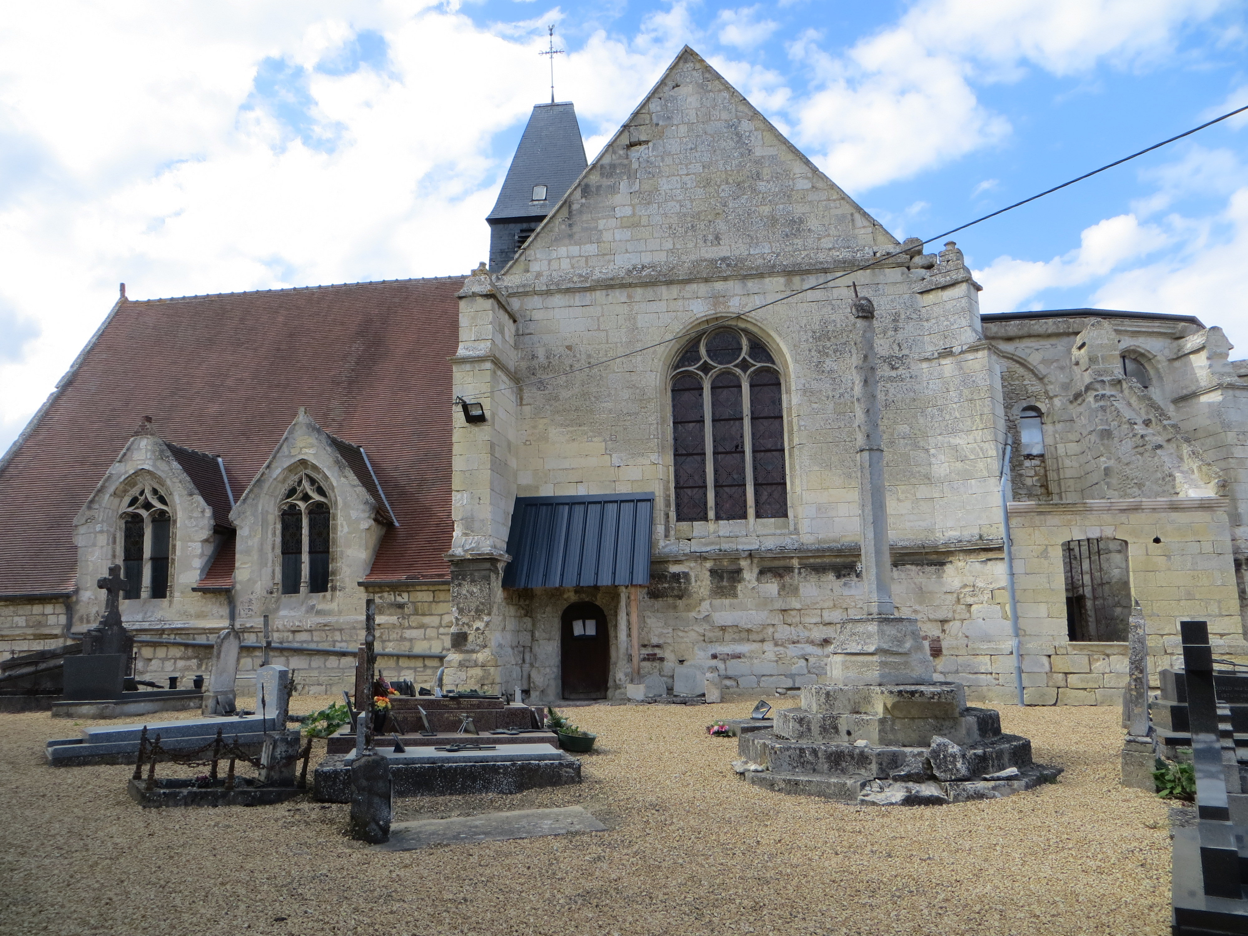 Vue générale de l'église